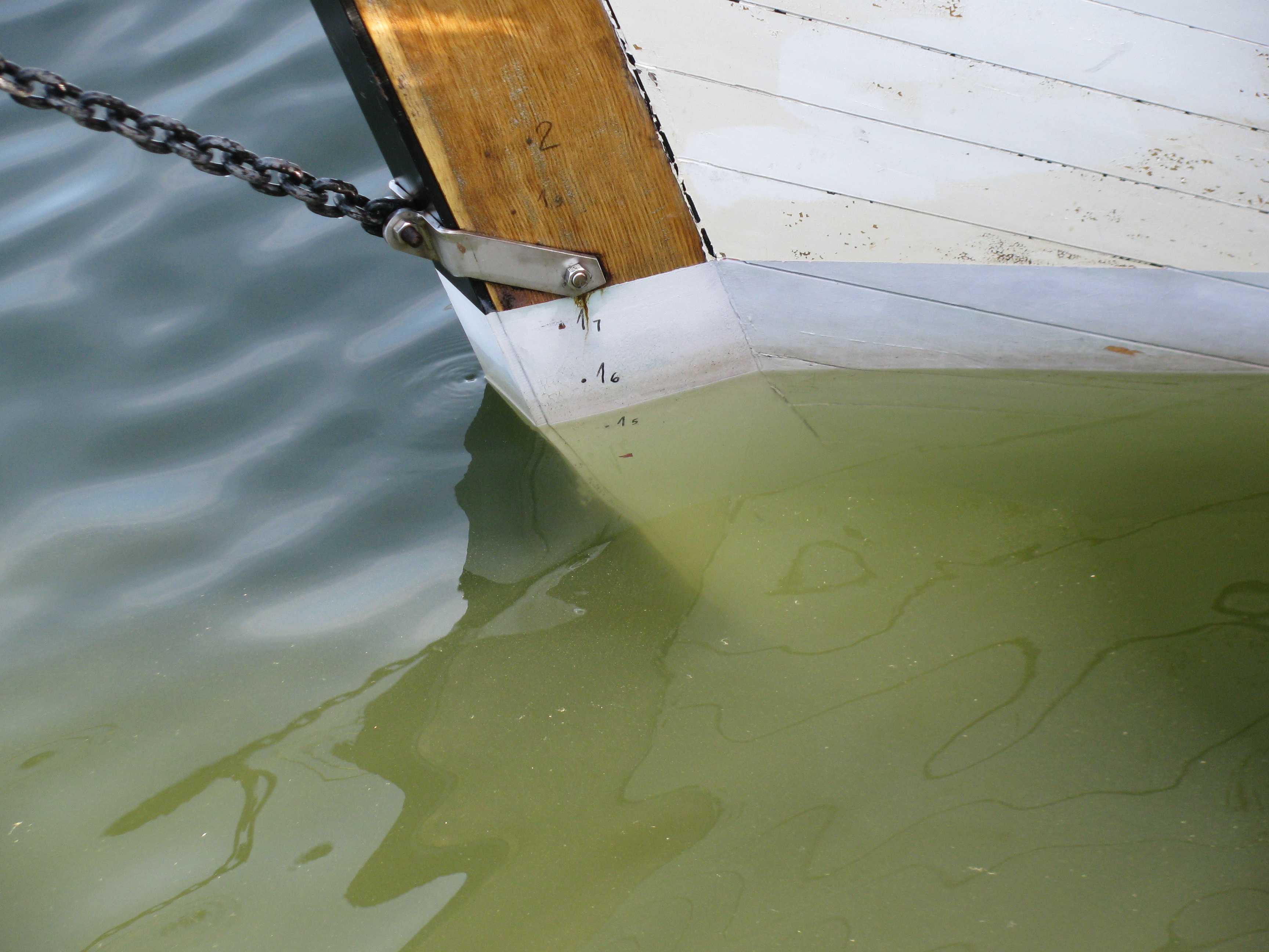 Kaljas Hoppeti kiil